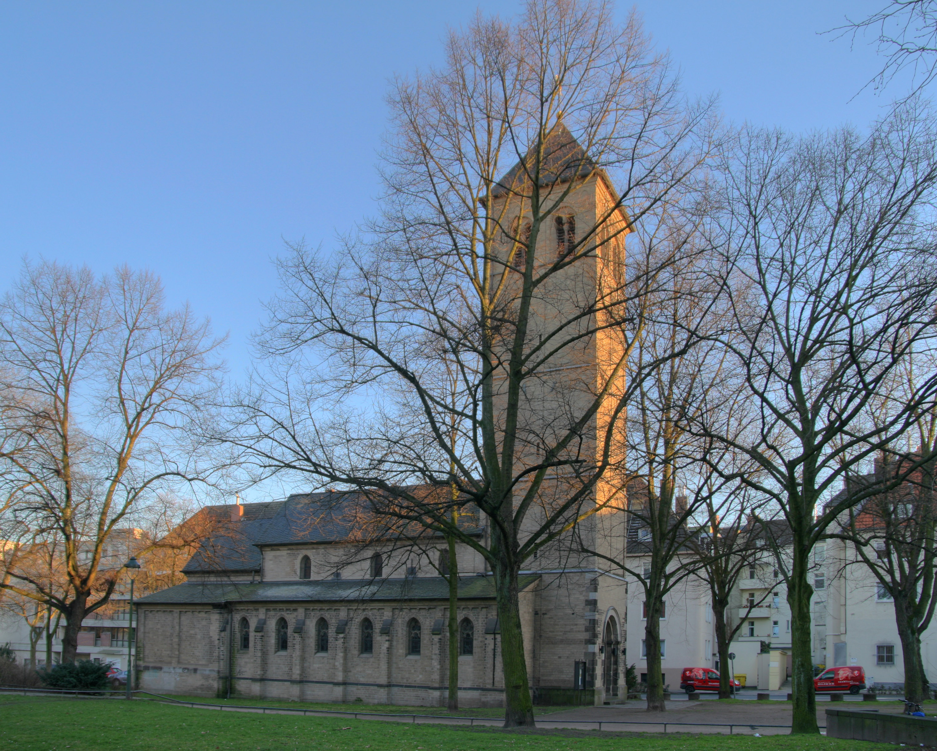 "Alt St. Martin" church in Düsseldorf, Germany